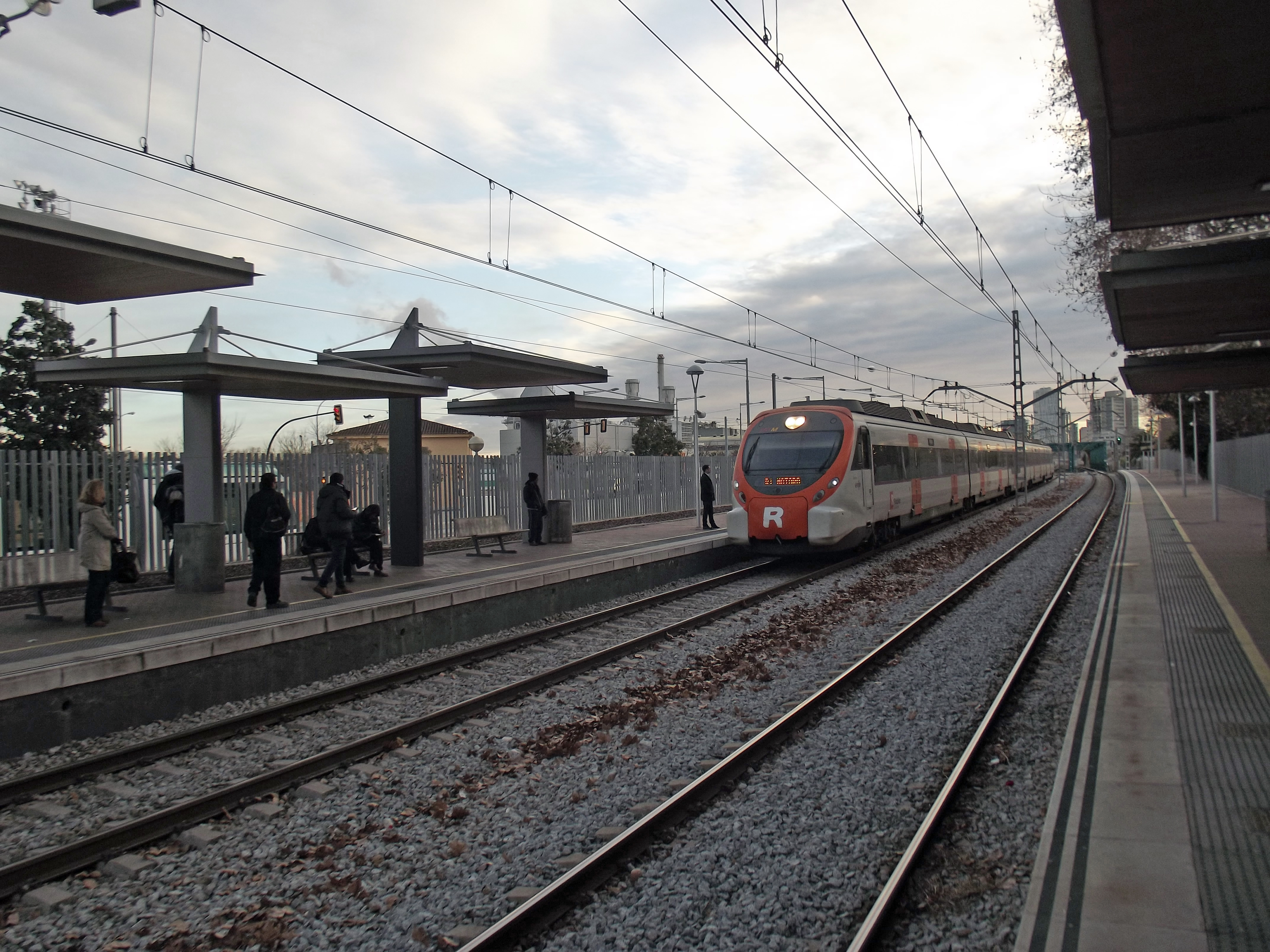 Rodalies trein in Sant Adrià de Besòs station